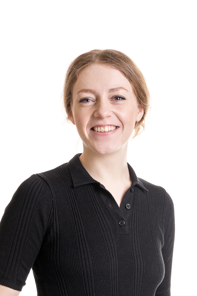 Bystyrerepresentant for Rødt Trondheim. Førstekandidat til Stortinget for Rødt Sør-Trøndelag.